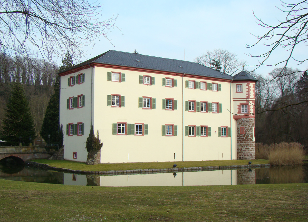 Schloss Eichtersheim in Angelbachtal-Eichtersheim